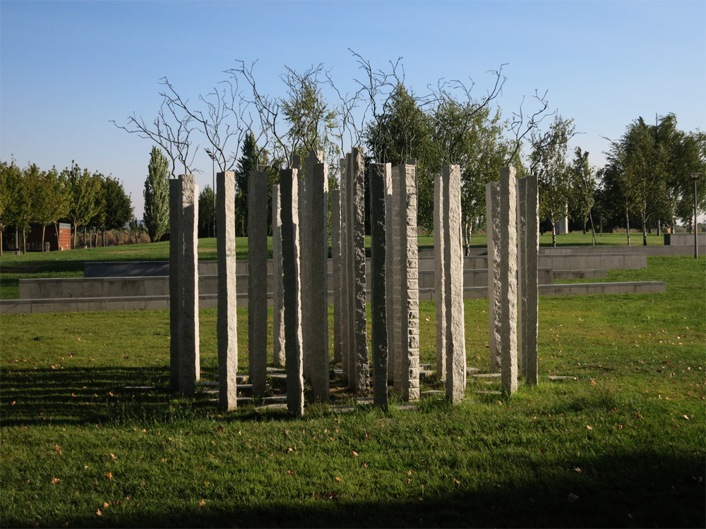 Alberto Carneiro, Sobre a floresta, 2012, granito e bronze, altura 350 cm; Parque de escultura contemporânea, Vila Nova da Barquinha